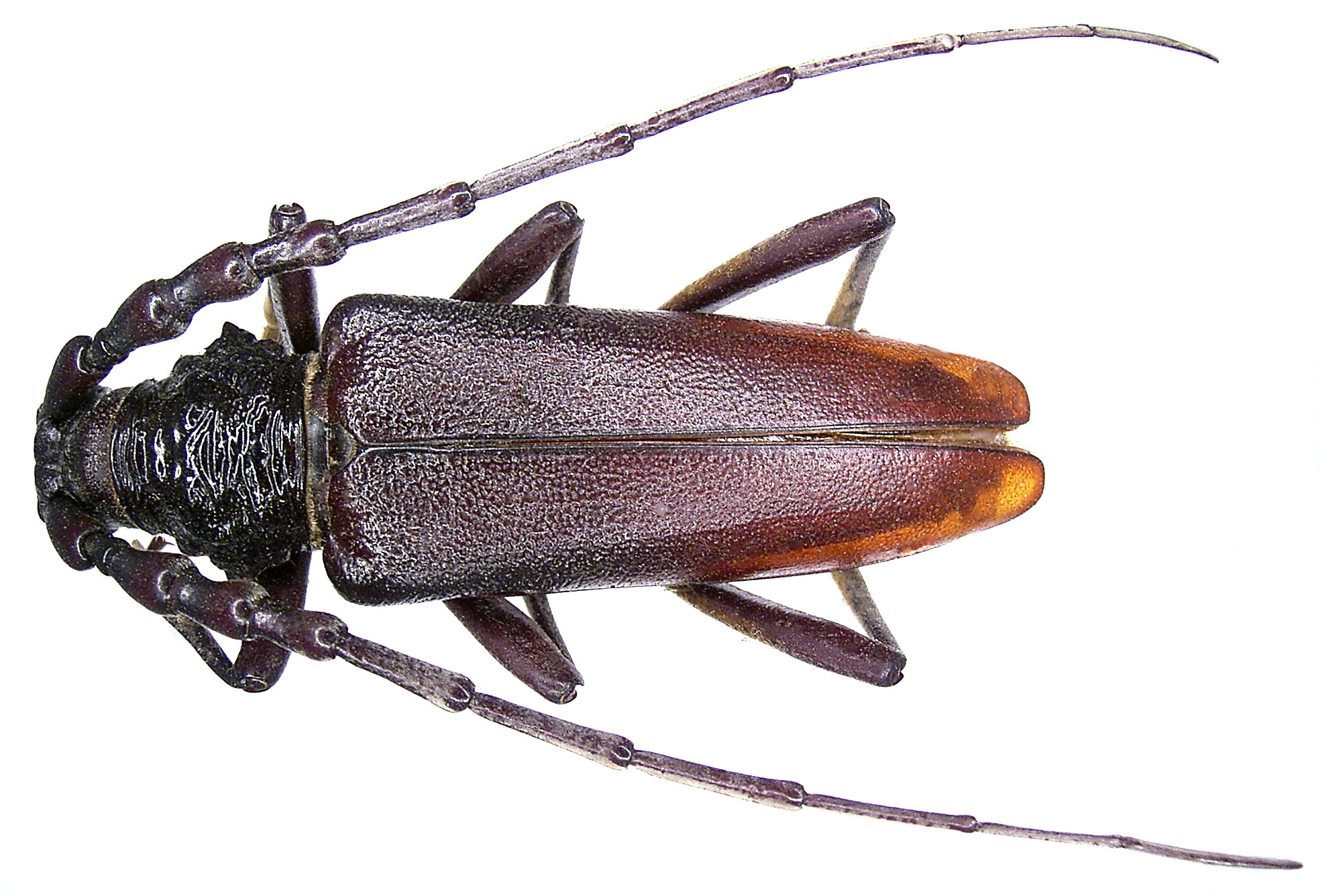 Familie: Cerambycidae Grösse: 32-46 mm Verbreitung: mediterran Ökologie: Entwicklung in Eichen Fundort: Kroatien, Mosor-Gebirge leg. D.Netolitzky; det. U.Schmidt, 1975 Foto: U.Schmidt, 2005